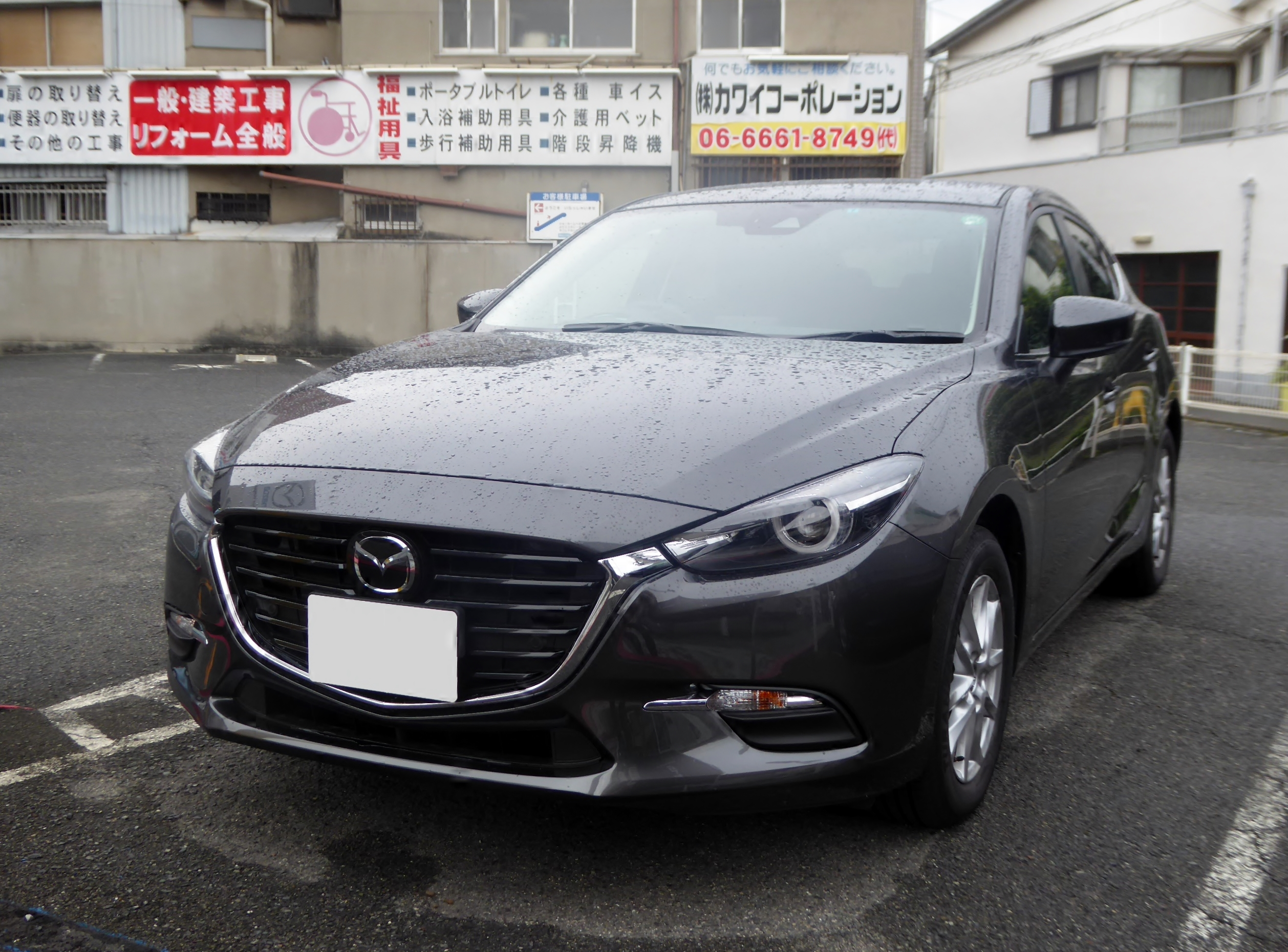 LDA-BMLFS型マツダ・アクセラスポーツ15XDプロアクティブをフロントから撮影。